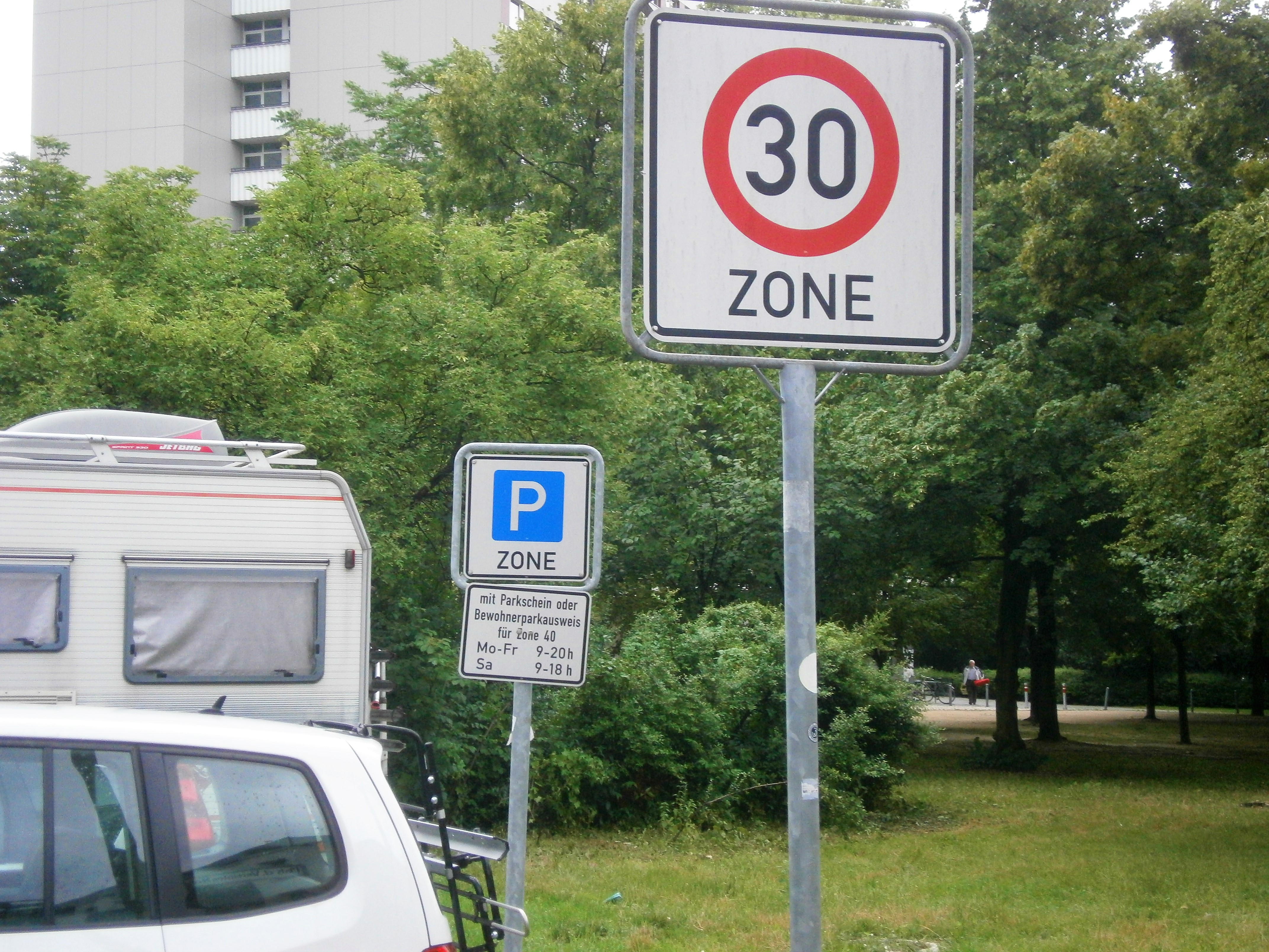 Die Friedenstraße ist eine Straße im Berliner Bezirk Friedrichshain-Kreuzberg, Ortsteil Friedrichshain. Angelegt und benannt wurde sie 1871-1876 auf dem Communicationsweg außerhalb der abgerissenen Berliner Zollmauer. Bereits seit dem Anlegen und der Bebauung bestand eine Teilung der Straße auf Königstadt und Stralauer Viertel. Aktuell sind es drei unterschiedene Straßenabschnitte: regionale Straßenverbindung im Barnimkiez am Volkspark Friedrichshain, am Platz der Vereinten Nationen als Parkzone, südlich im (Planungsraum) "Friedenstraße" als Ergänzungsstraße. Im Bild die Ausschilderung Park- und Tempo 30-Zone am verkehrsberuhigten mittleren Abschnitt in Höhe des Platzes der Vereinten Nationen.